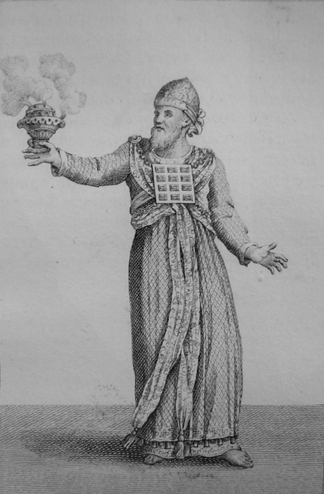 Reproducción artística "Sommo Sacerdote" que ilustra el libro Storia dell' Antico e Nuovo Testamento, de Agostino Calmet.